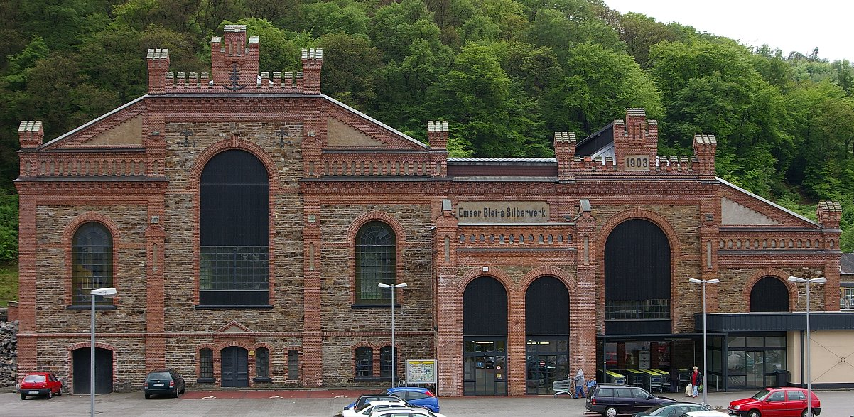 Power plant, Emser Blei- & Silberwerk (von 1903), Bad Ems